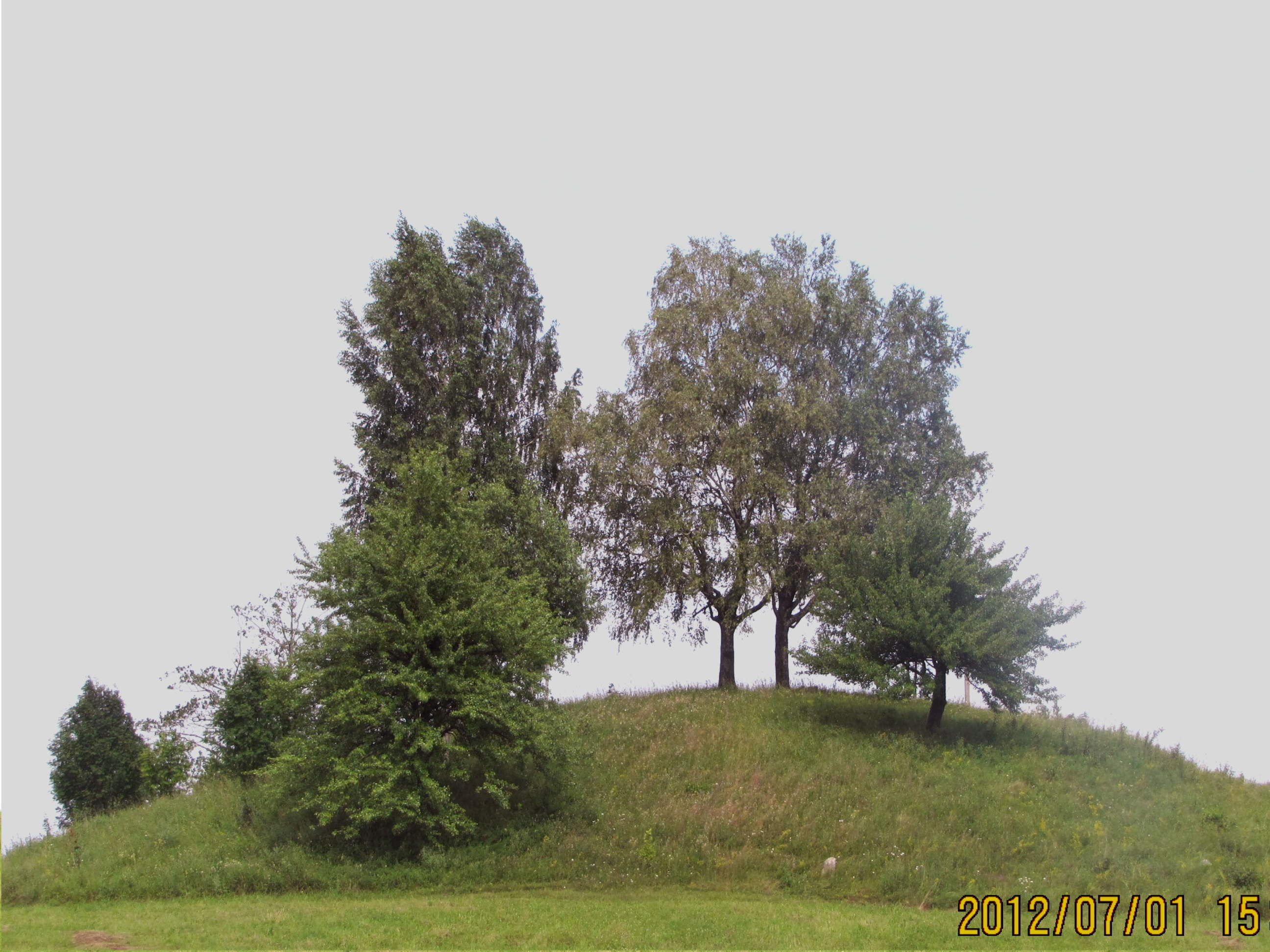 Nuotraukoje Vinco Mykolaičio - Putino numylėtas Aušrakalnis. Nuotraukos autorius Vytautas Degutis.